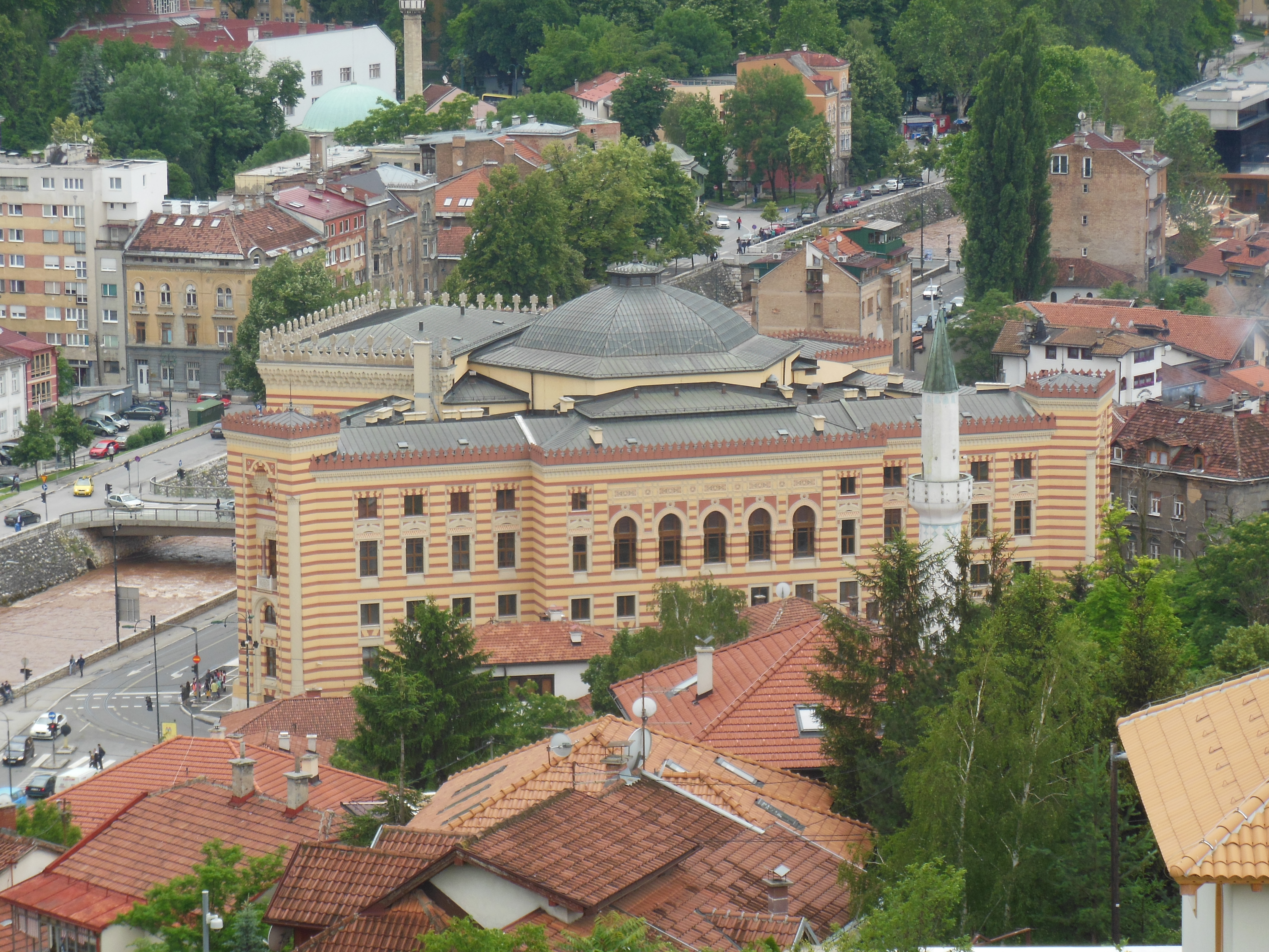 Pogled na Vijećnicu sa Žute tabije